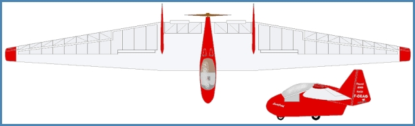 Fauvel AV45